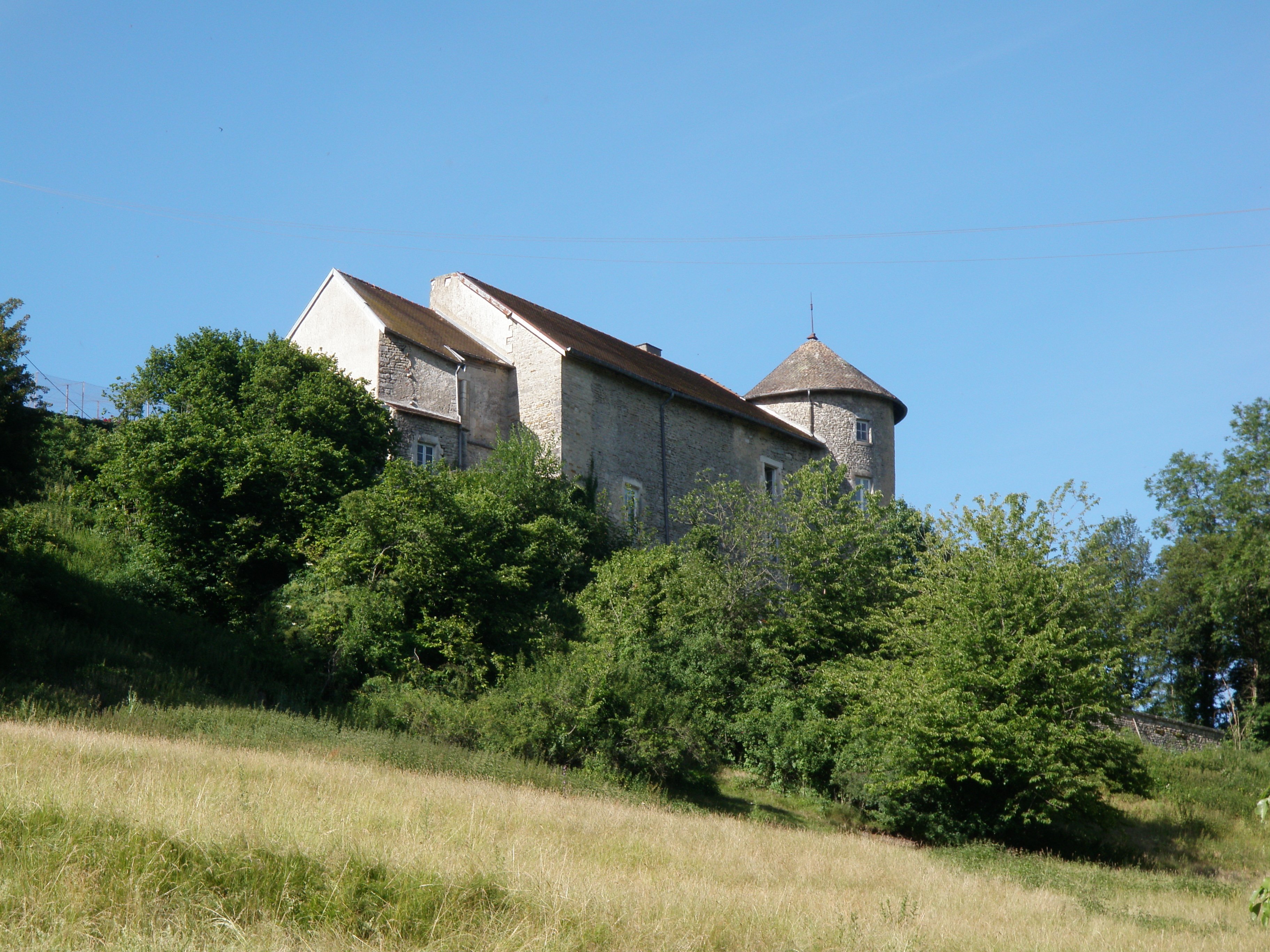 Château de Rorthey à Sionne (rempart sud)